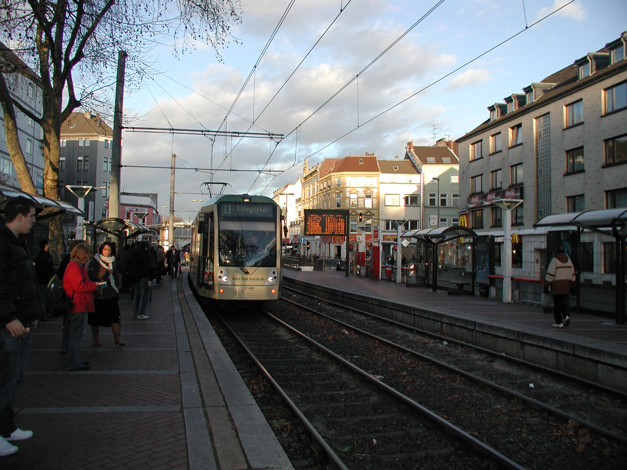 Köln-Ehrenfeld, Station Venloer Str. / Gürtel